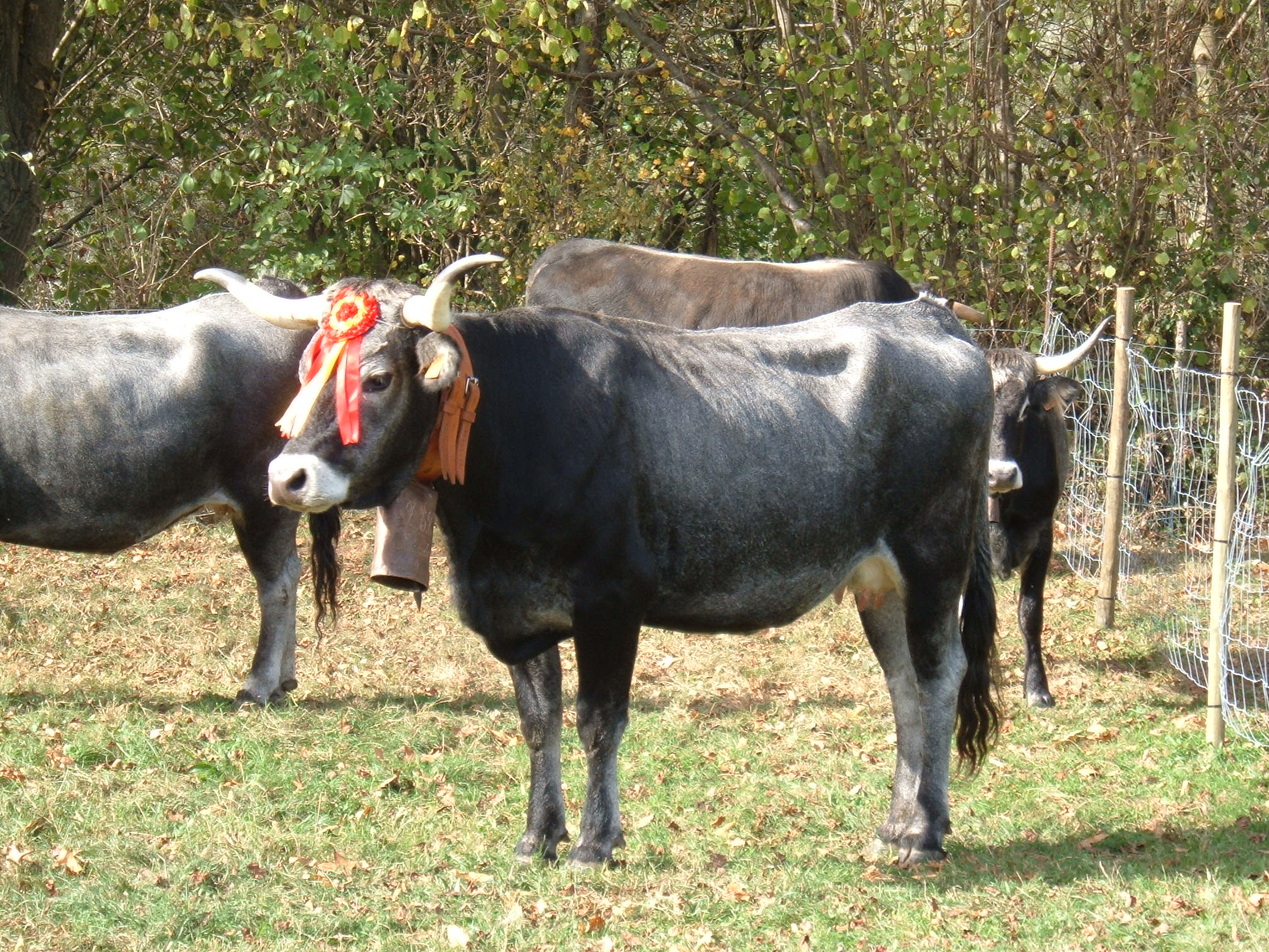 Ganado de raza Tudanca en la feria de Ruente, Cantabria.